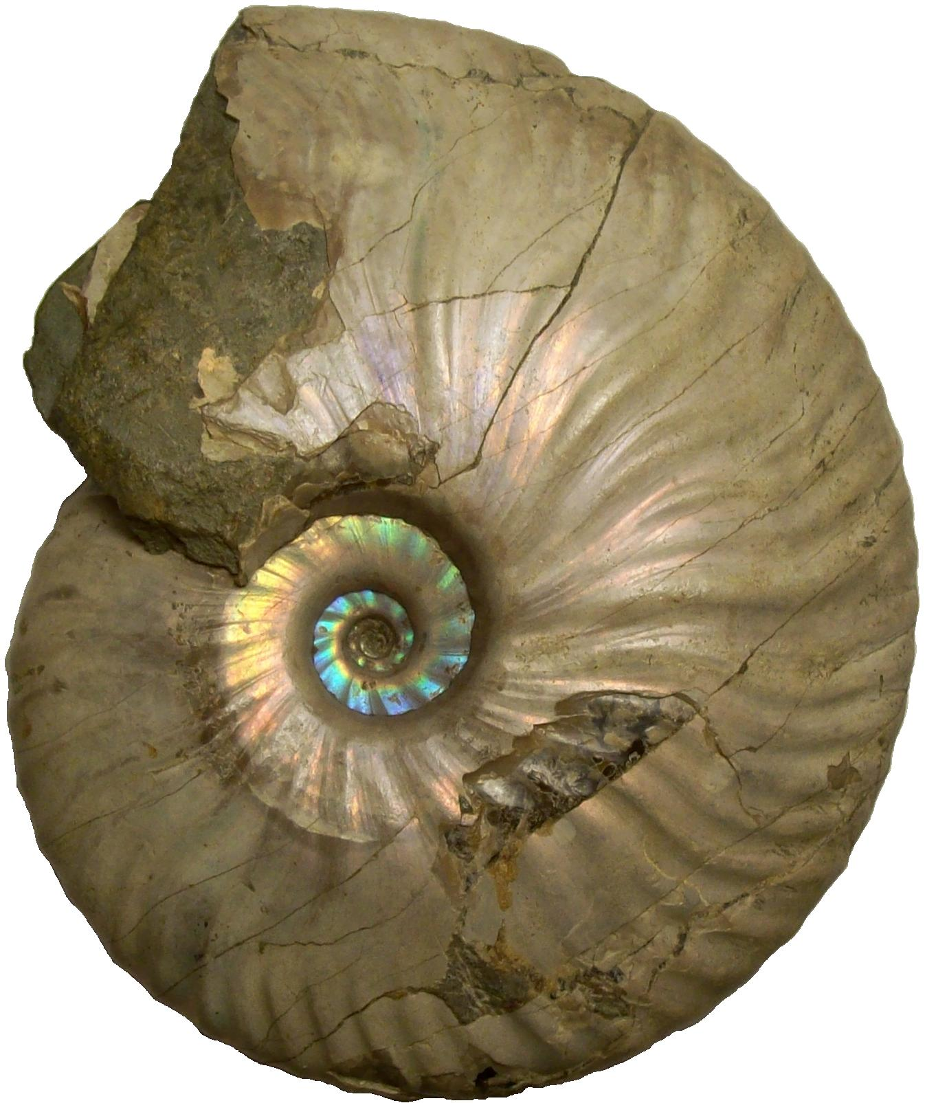 Ammonite del genere Cleoniceras (sensu lato) proveniente dal Madagascar. Diametro massimo = 9.5 cm ; larghezza massima del giro = 2.2 cm ; altezza massima del giro: 4.5 cm . dalla mia collezione personale.